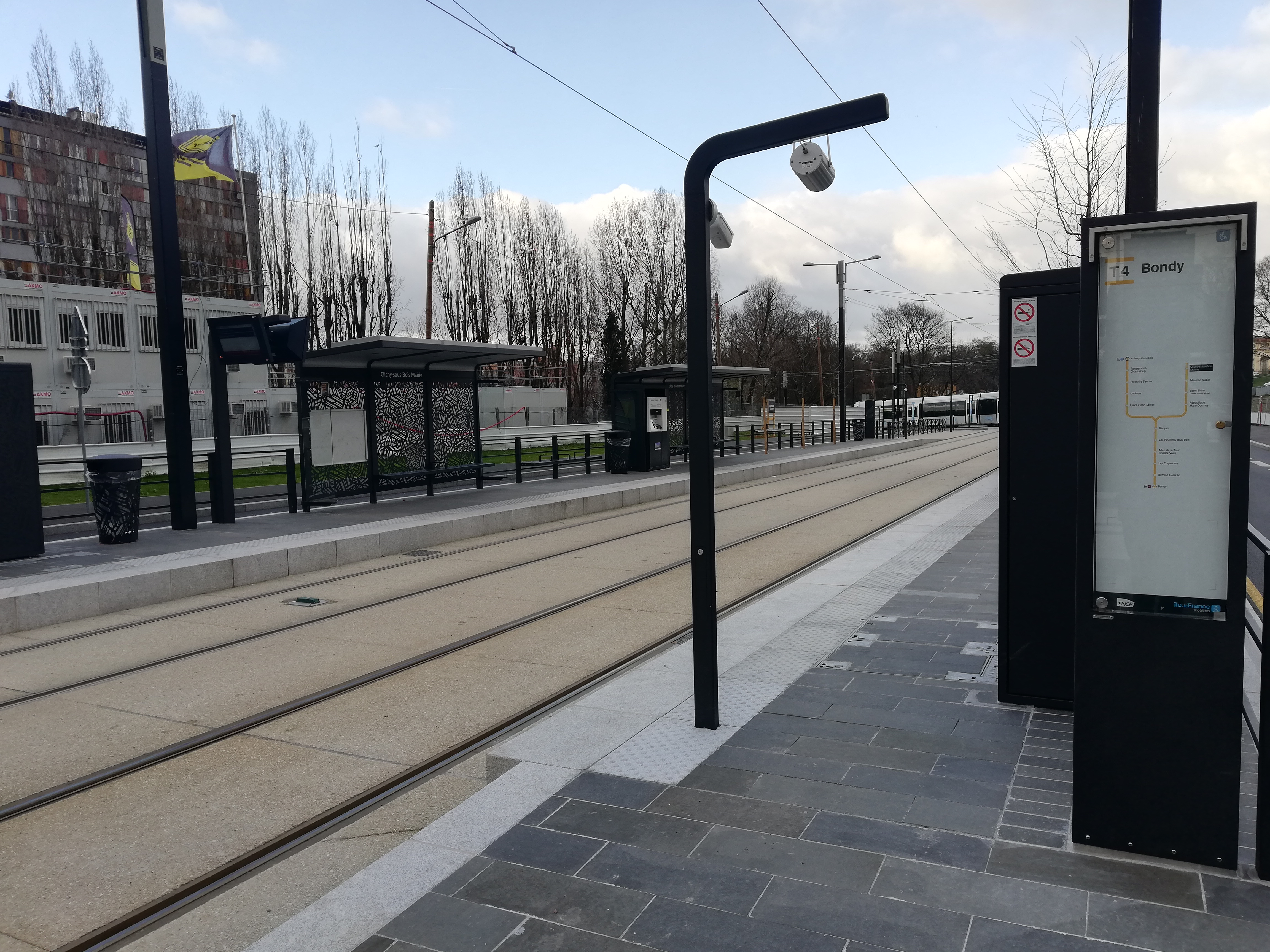 Quais de la station Clichy-sous-Bois - Mairie de la ligne 4 du tramway d'Île-de-France, en 2020.